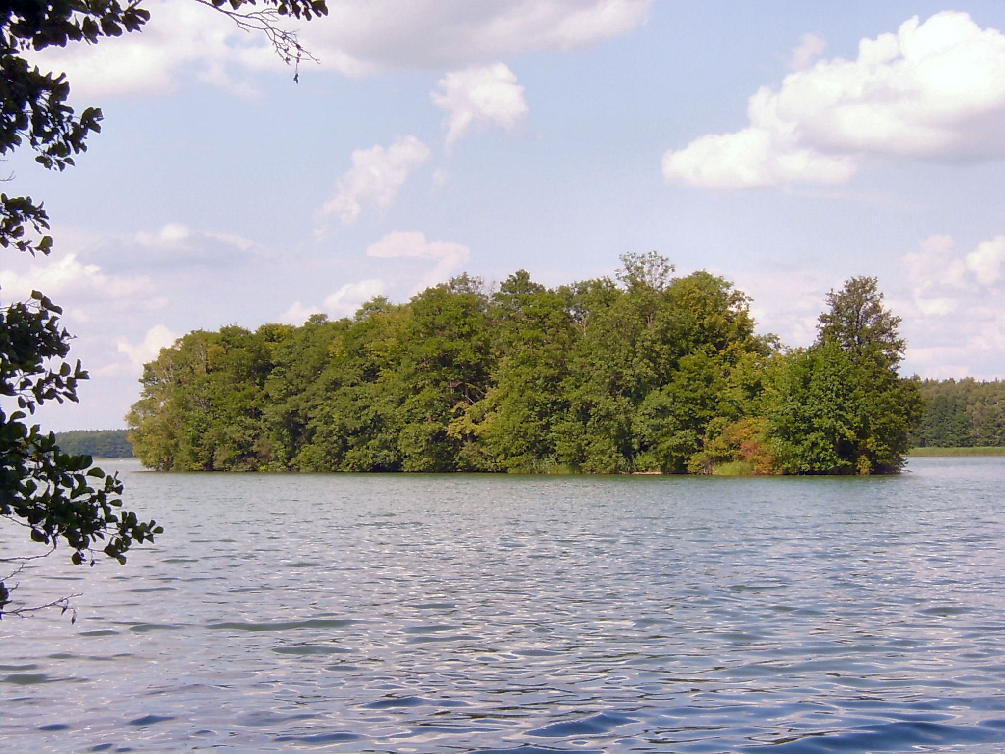 Jezioro Lubiatówko - wyspa w rezerwacie Łabędziniec